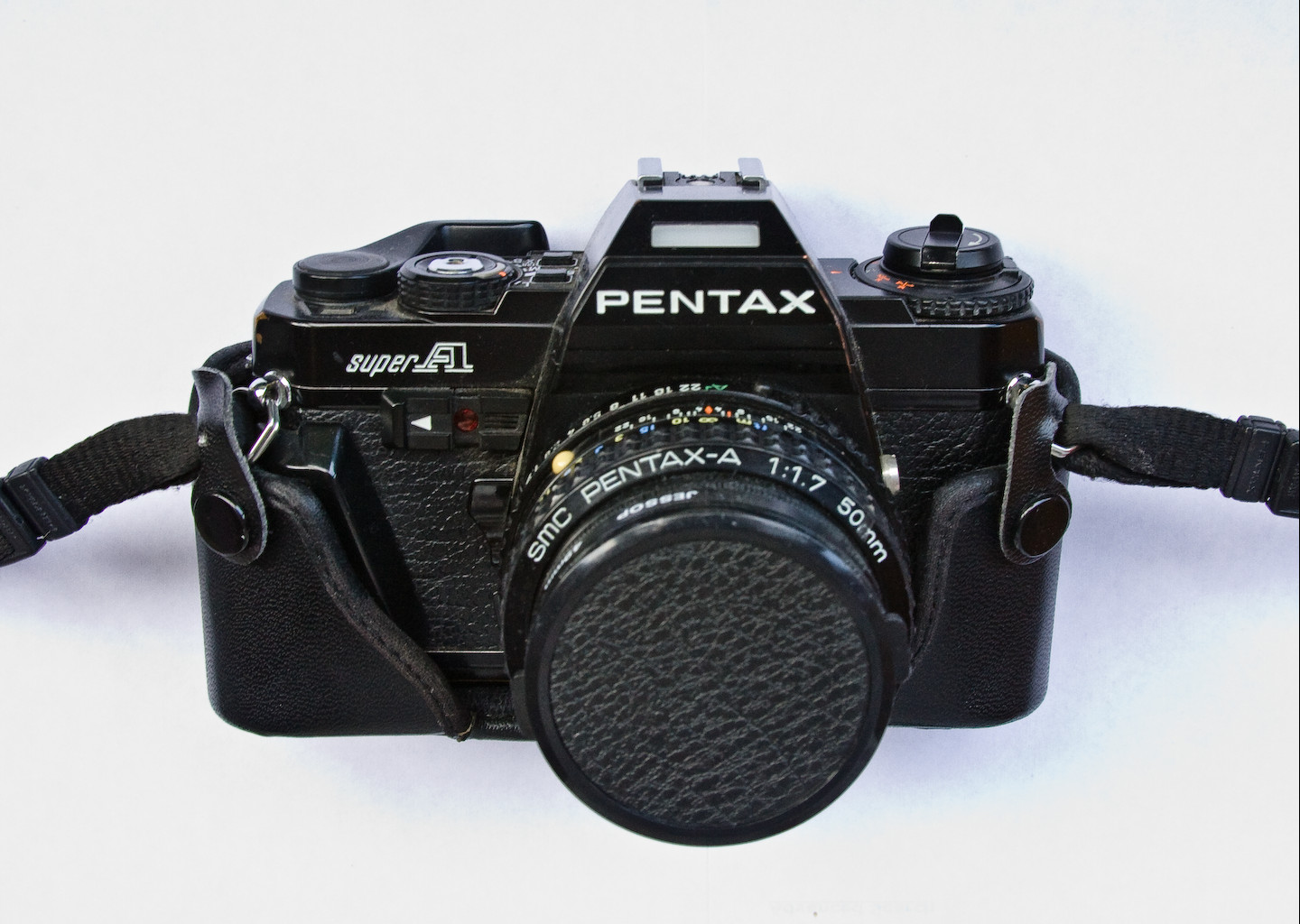 Pentax Super-A camera